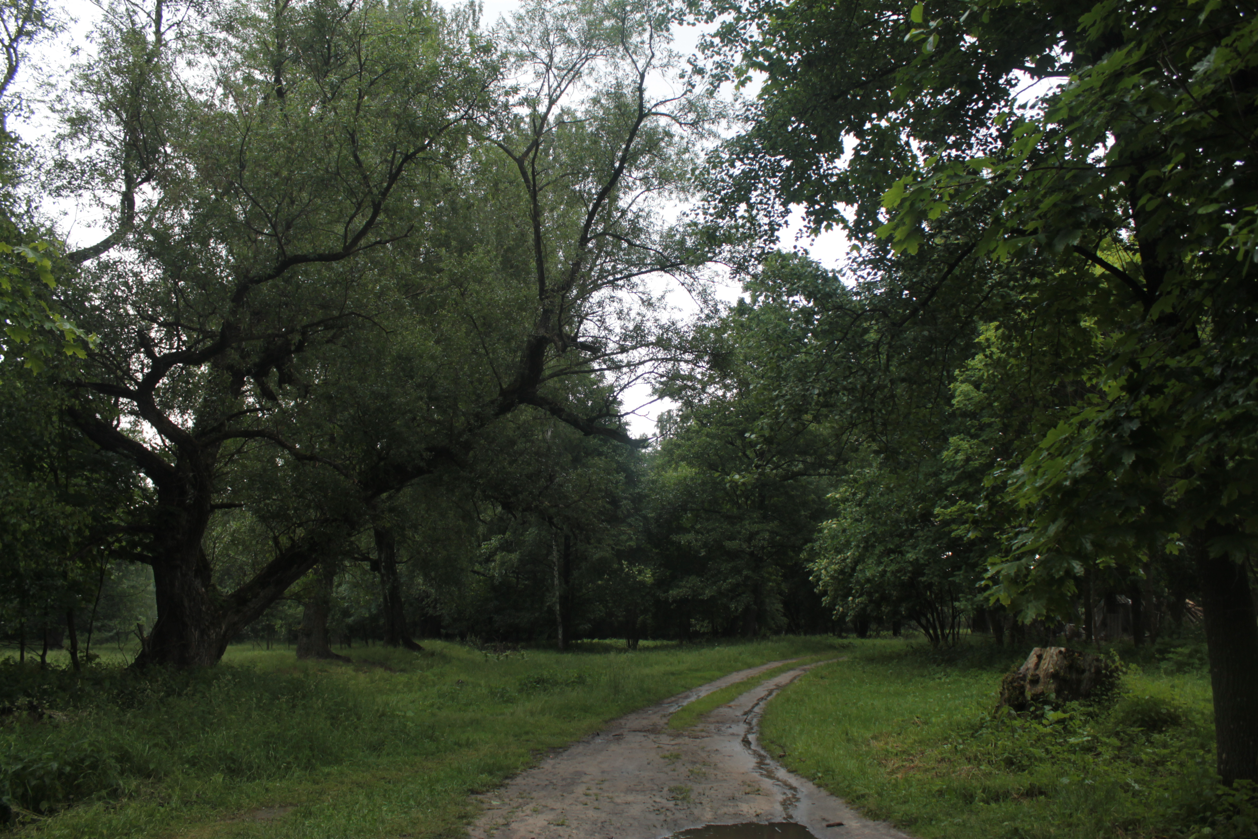 Старое дерево (Old tree)